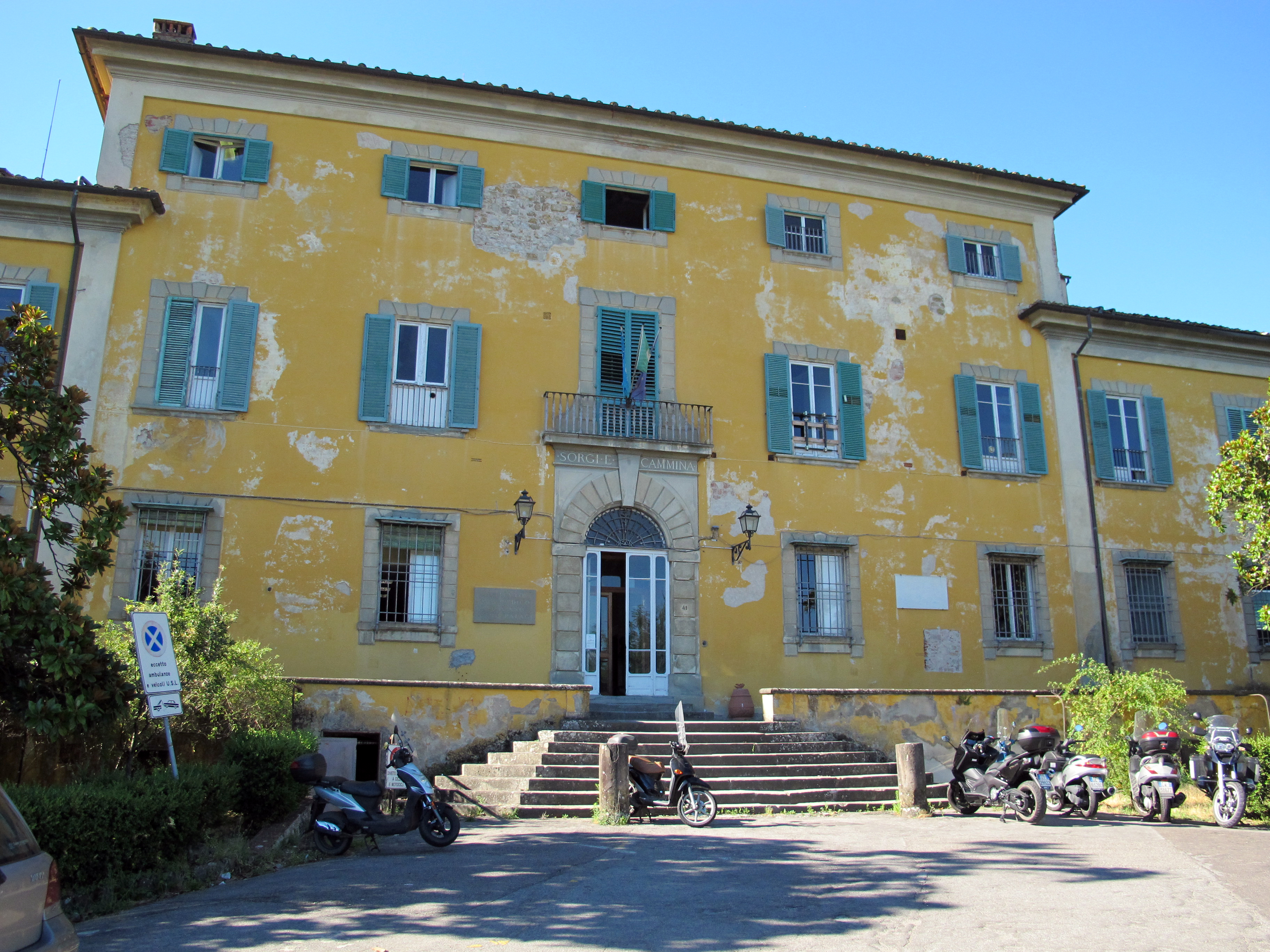 Ospedale Pietro Palagi, Florence